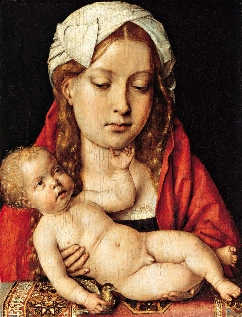 Maria mit dem KindEesti: Madonna lapsega, Don Diego de Guavara diptühhon